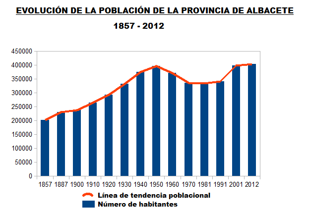 Evolución de la población de la Provincia de Albacete entre 1857 y 2012